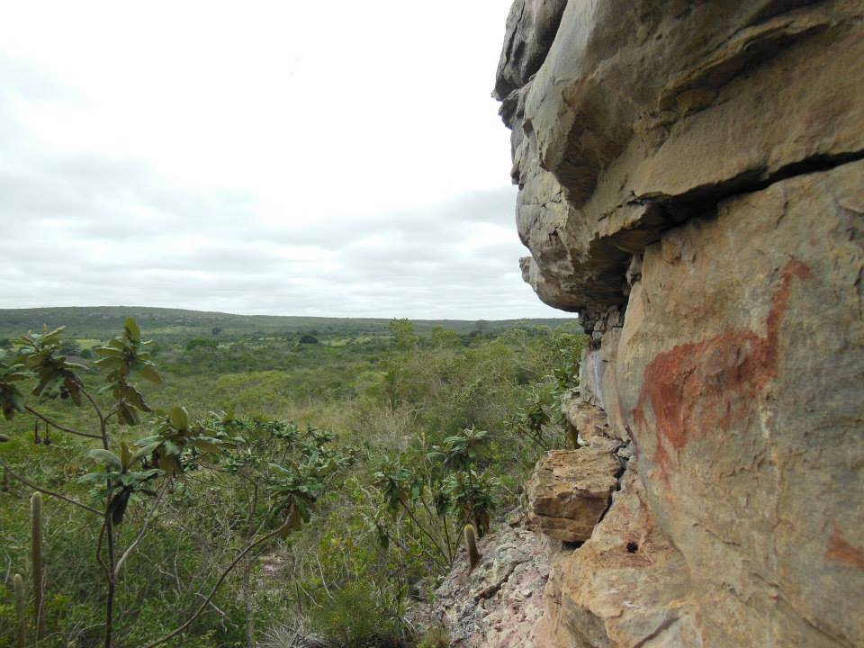 O Parque Estadual de Morro do Chapéu tem muitos afloramentos de arenitos e abrigos sobre rocha, onde podem ser observadas pinturas rupestres pré-históricas.